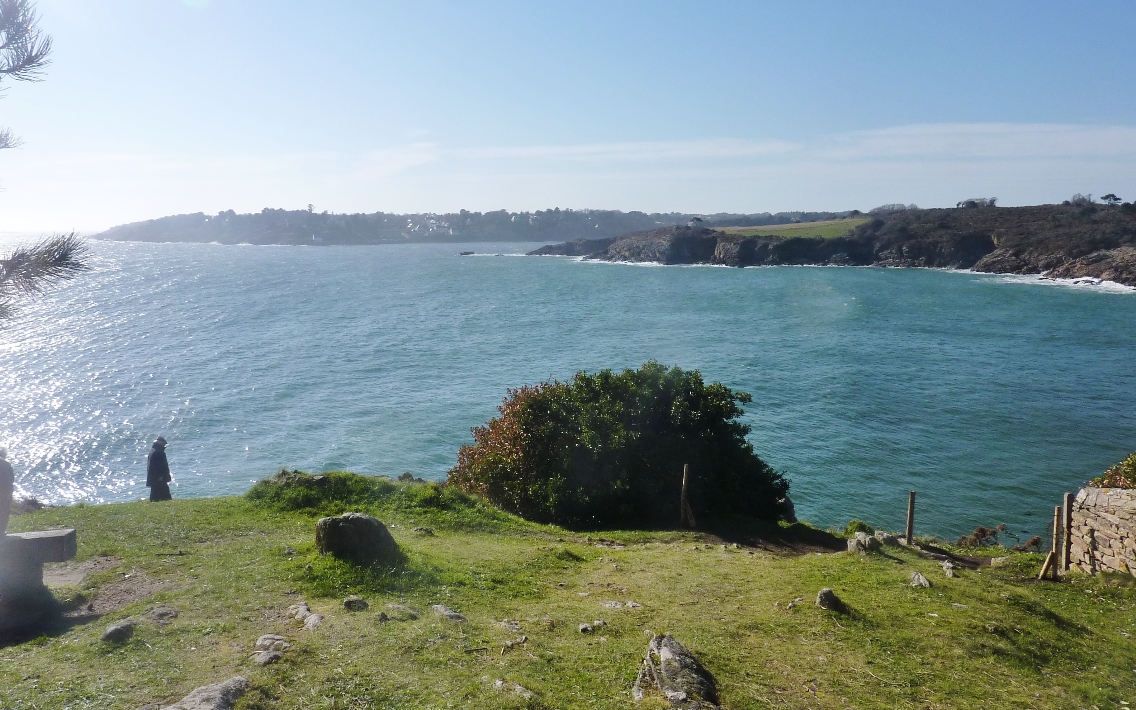 La Pointe de Penquernéo (entre les rias de l'Aven et du Belon) et à l'arrière-plan la pointe de Beg-ar-Véchen à Port-Manec'h vus de Kerfany-les-Pins, pointe de Minbriz.